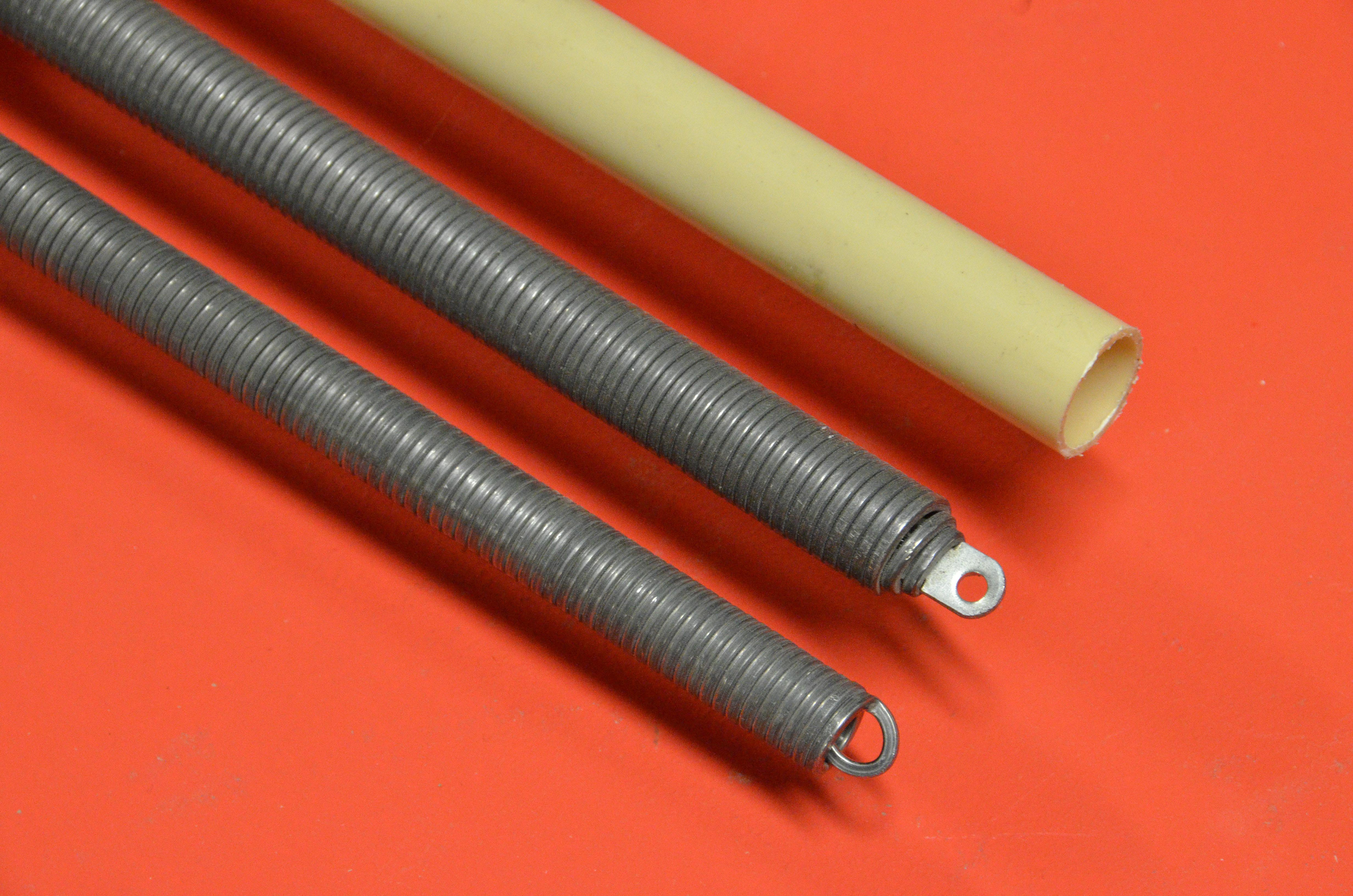 Buigveer